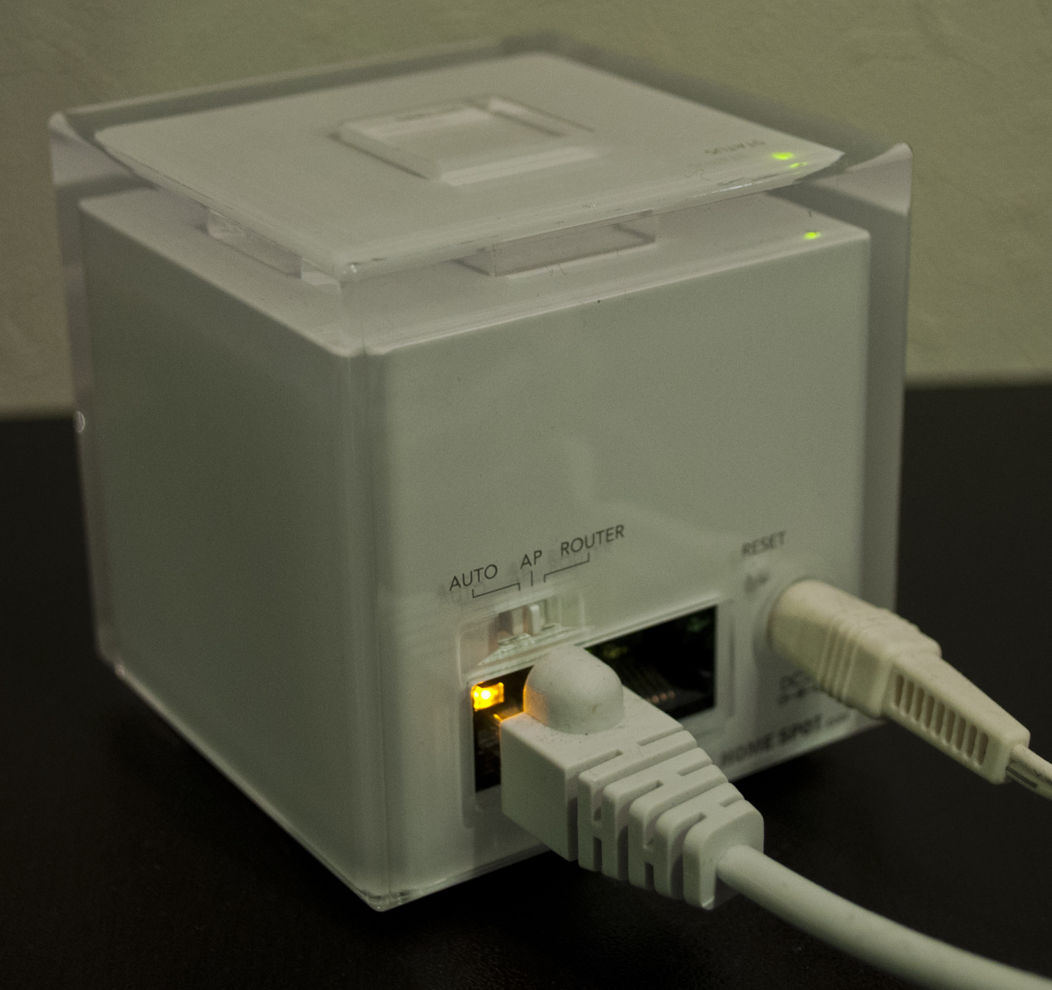 auが提供しているHOME SPOT CUBEの背面